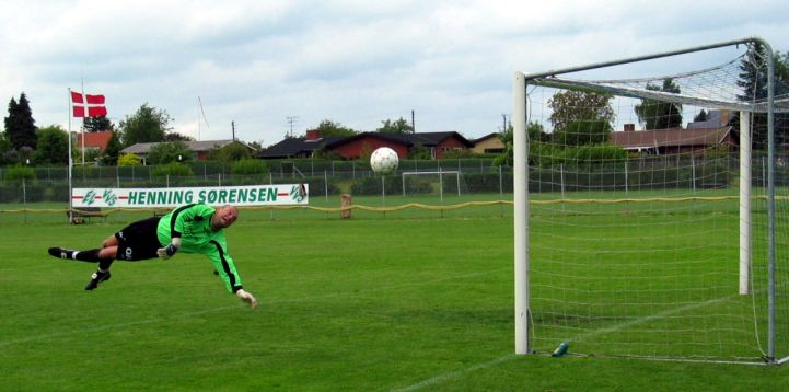 Fodboldmålmand klarer i fuld længde et langskud. Toivo Vadum fra Næsby i 2.divisions-kampen mod Værløse d. 4. juni 2005 Match details